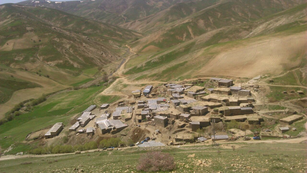 باراوا (بهرام آباد) نوروز 96، عکس از بالای پایگاه نظامی متروکه انداخته شده است.